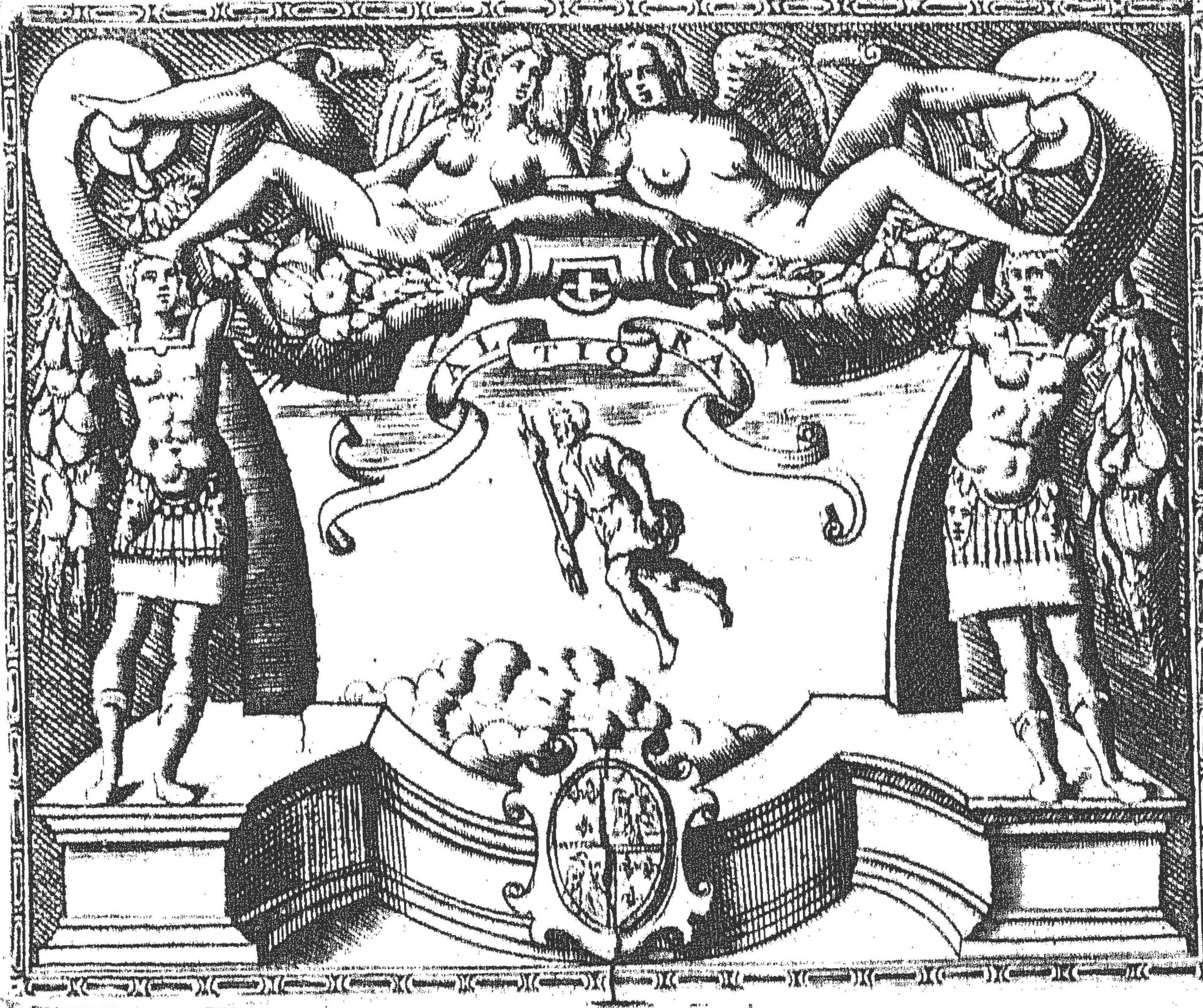 L'Impresa (in linguaggio araldico indica figura accompagnata da motto o frase) del cardinale Luigi d'Este (1538-1586) raffigurante Prometeo che ascende verso il cielo con il motto latino "ALTIORA". In basso lo stemma degli Este con le aquile ed i gigli.